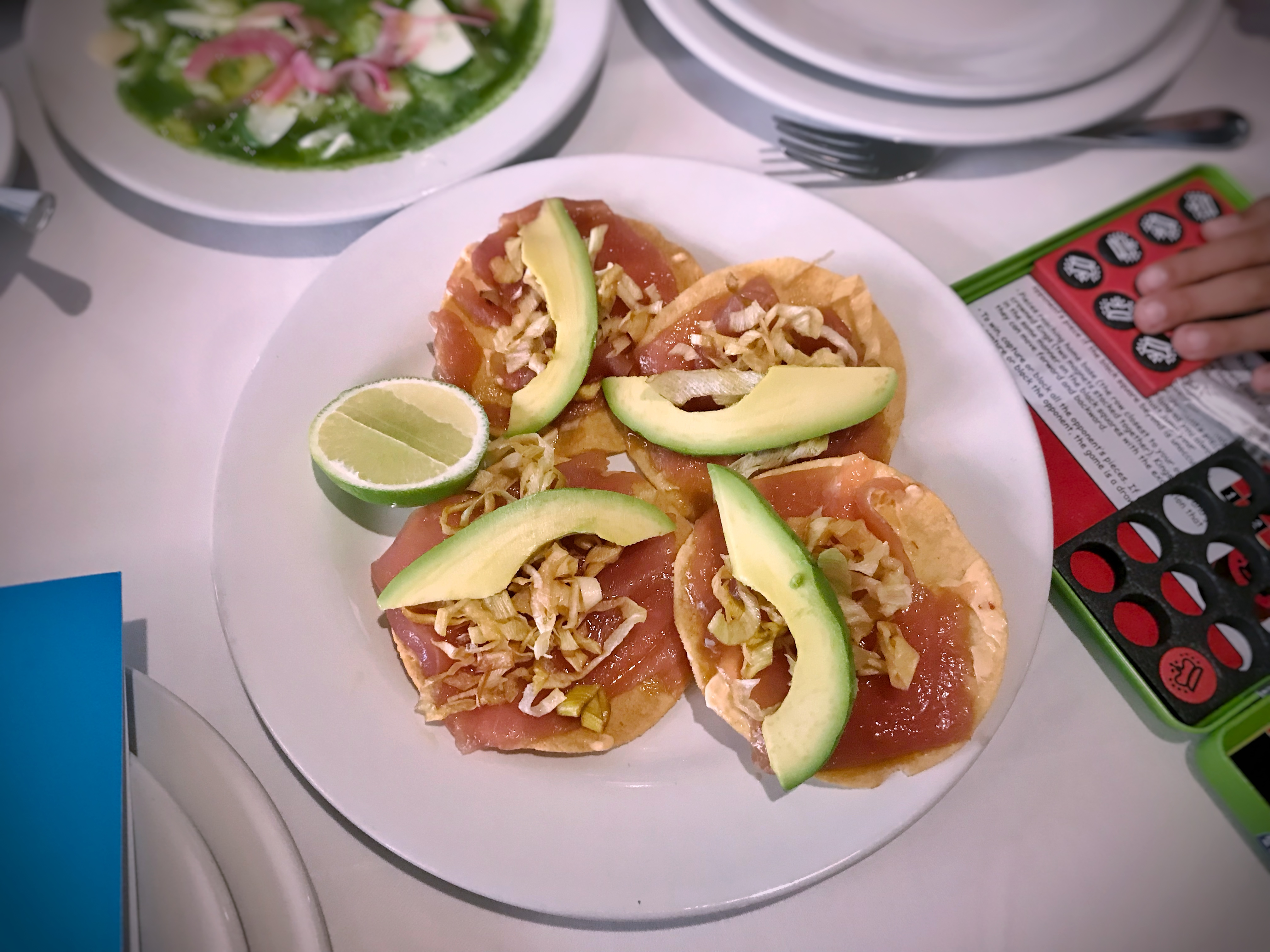 Contramar, Roma Norte, CDMX, Mexico.